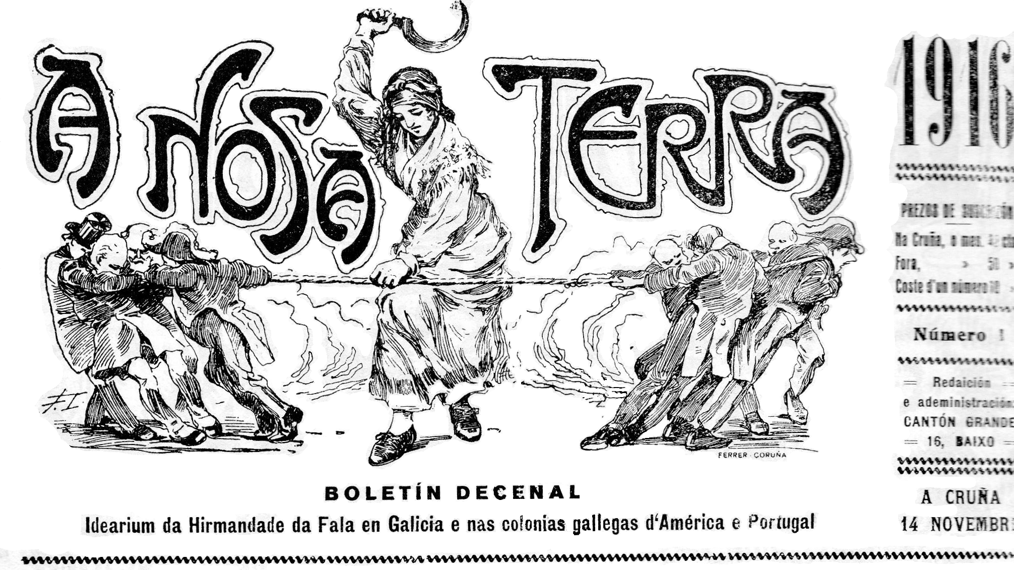 Gravado da cabeceira de A Nosa Terra, voceiro das Irmandades da Fala.